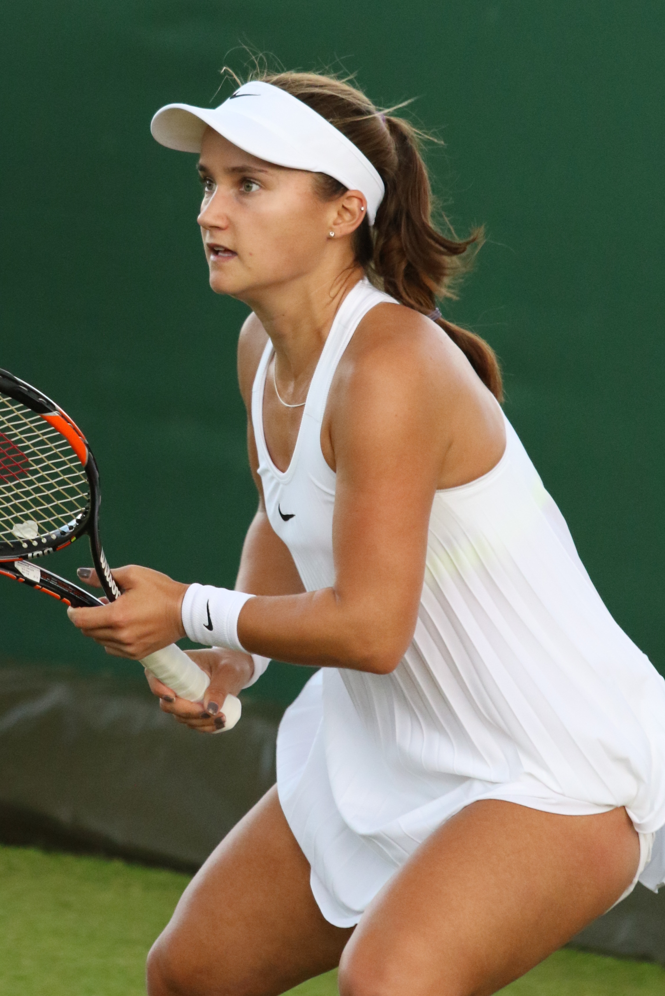 Davis WMQ16 (5)